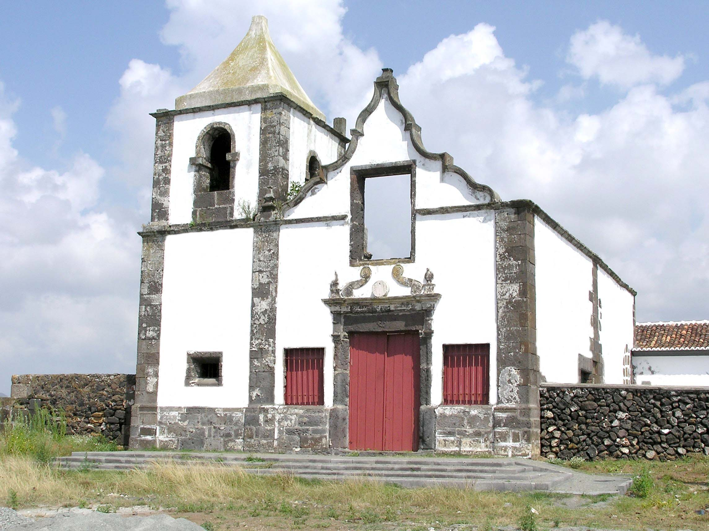 Igreja Velha de São Mateus da Calheta, fachada, Terceira, Açores, Portugal.